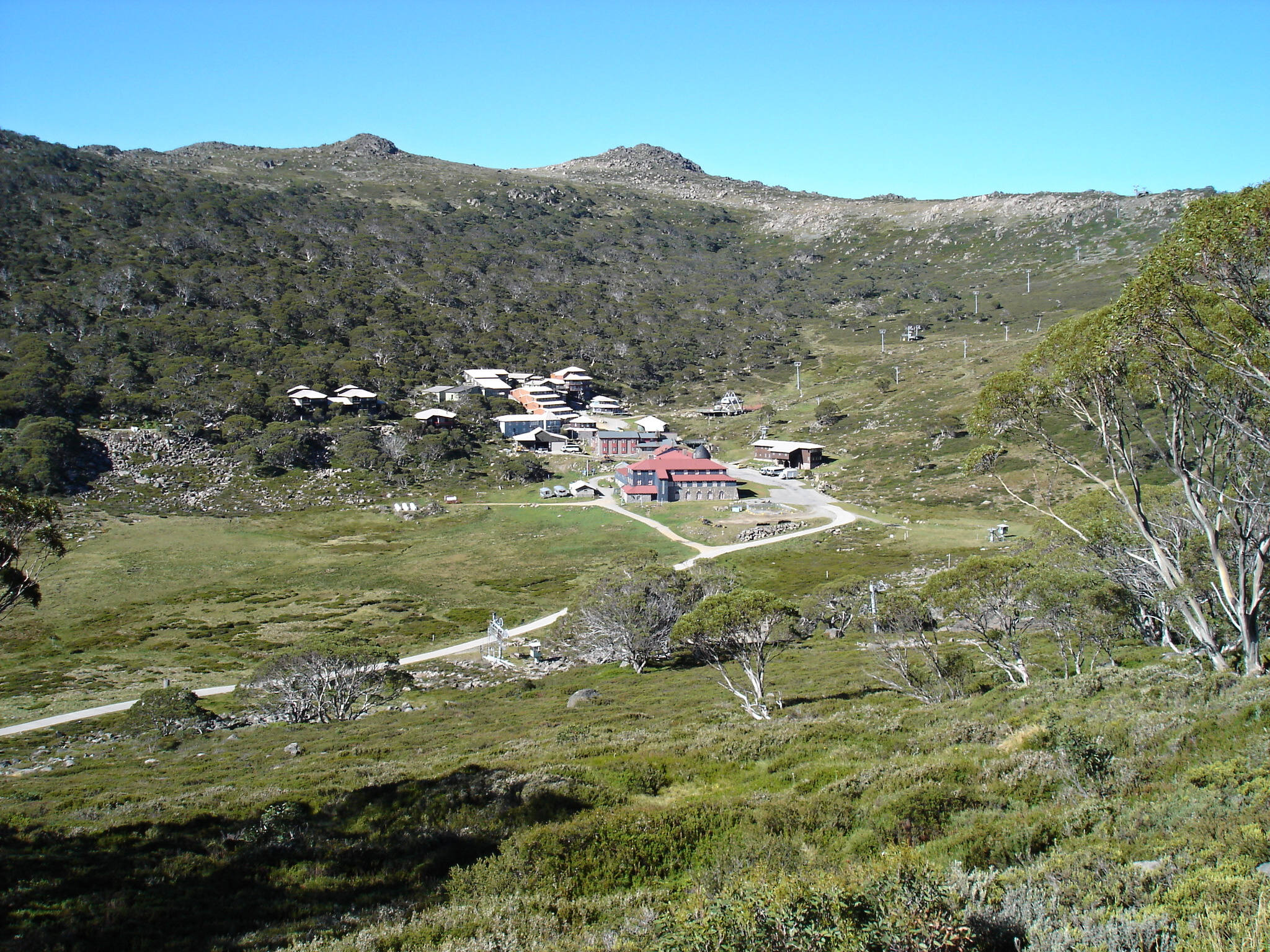 Charlotte's Pass - village